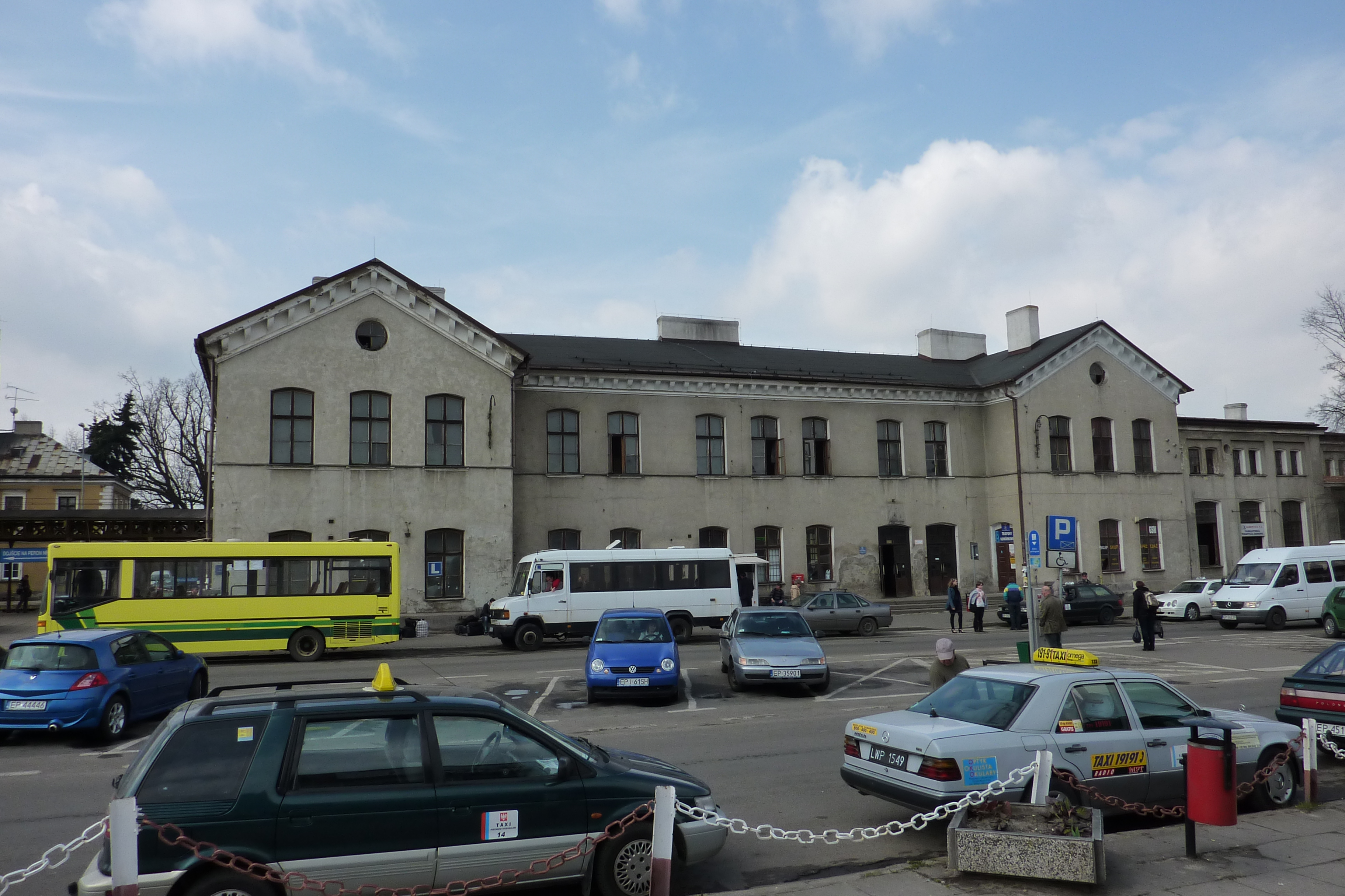 Dworzec PKP (dawny dworzec Kolei Warszawsko-Wiedeńskiej (zabytek nr A-440)